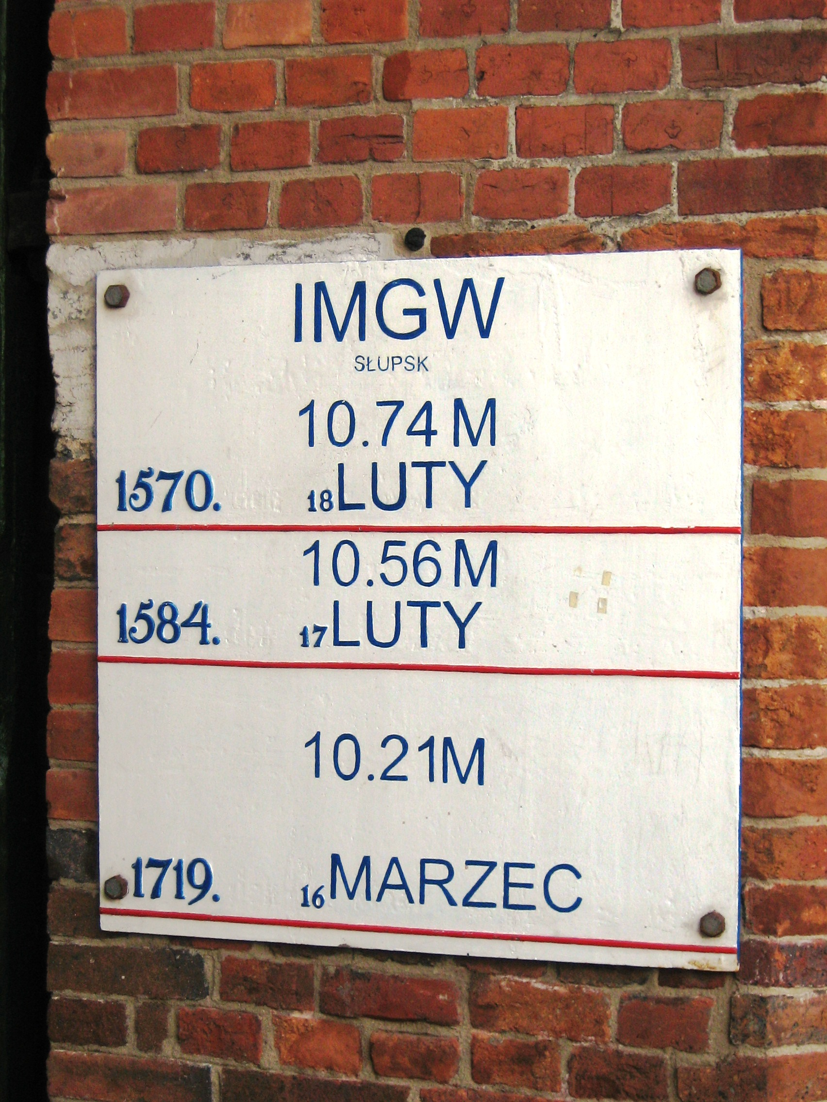 Toruń, Brama Mostowa - tablica z historycznymi stanami wody na Wiśle (zabytek nr A/46/180)